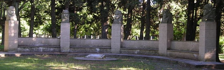 "Monumento a los Cinco Sabios": Pedro Bonifacio Palacios (Almafuerte), Florentino Ameghino, Alejandro Korn, Carlos Spegazzini y Juan Vucetich, La Plata (Argentina), Museo de Ciencias Naturales. Obra del escultor Máximo Maldonado. Foto recortada de la original sin edición.